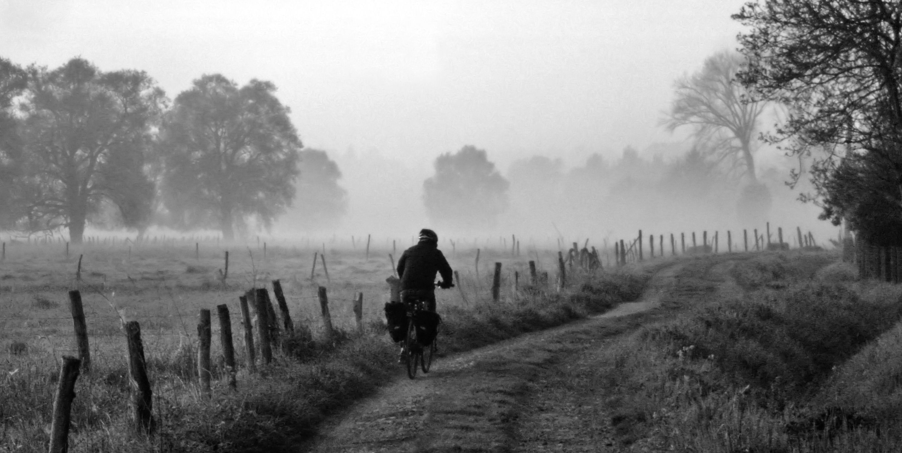 a morning in April, Korbeek-Dijle, Belgium